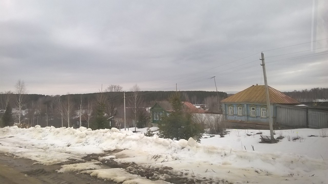 первая улица